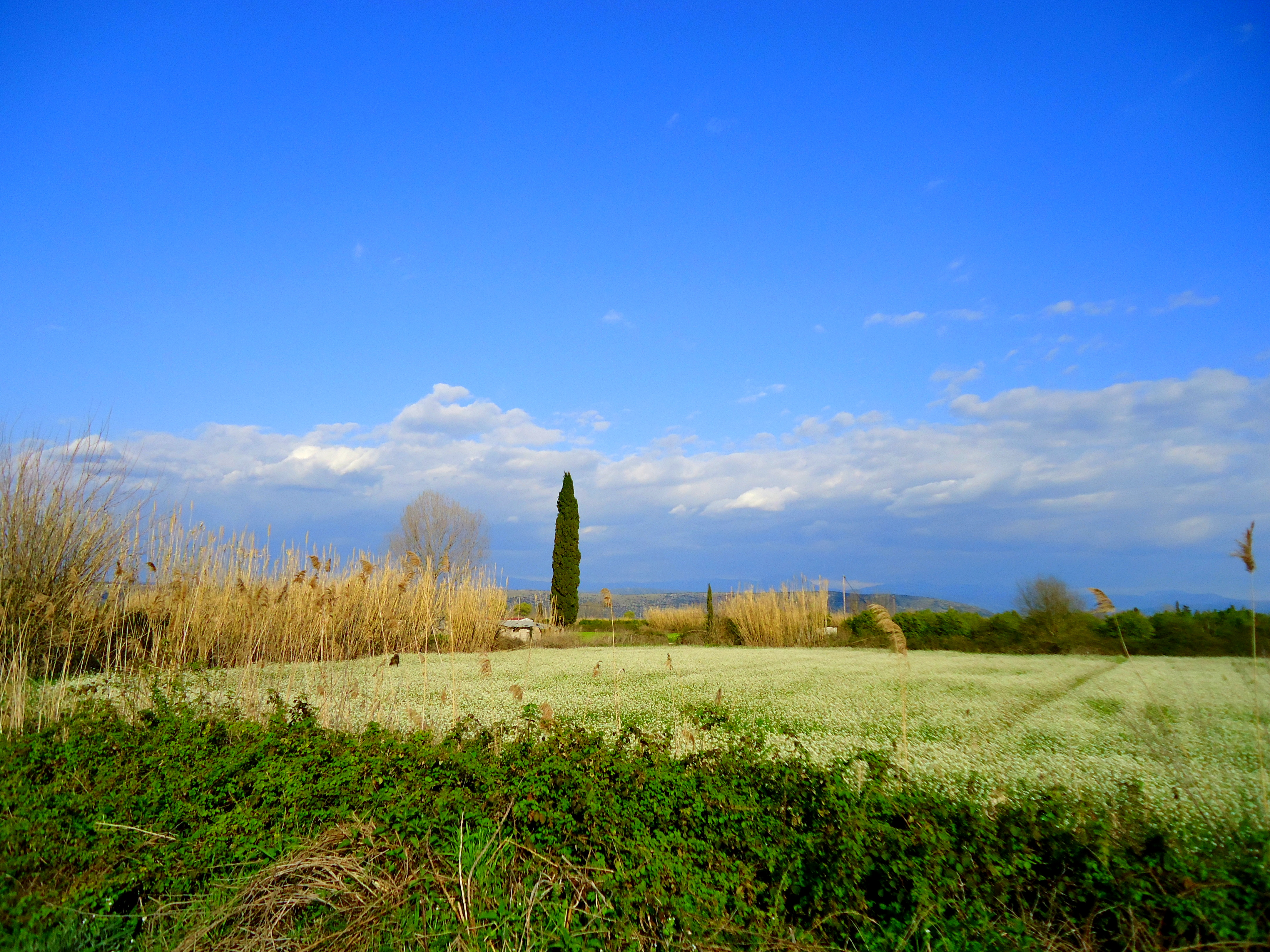 Αγροτεμάχιο στη Γαβριά, στο δρόμο προς Κωστακιούς Άρτας.